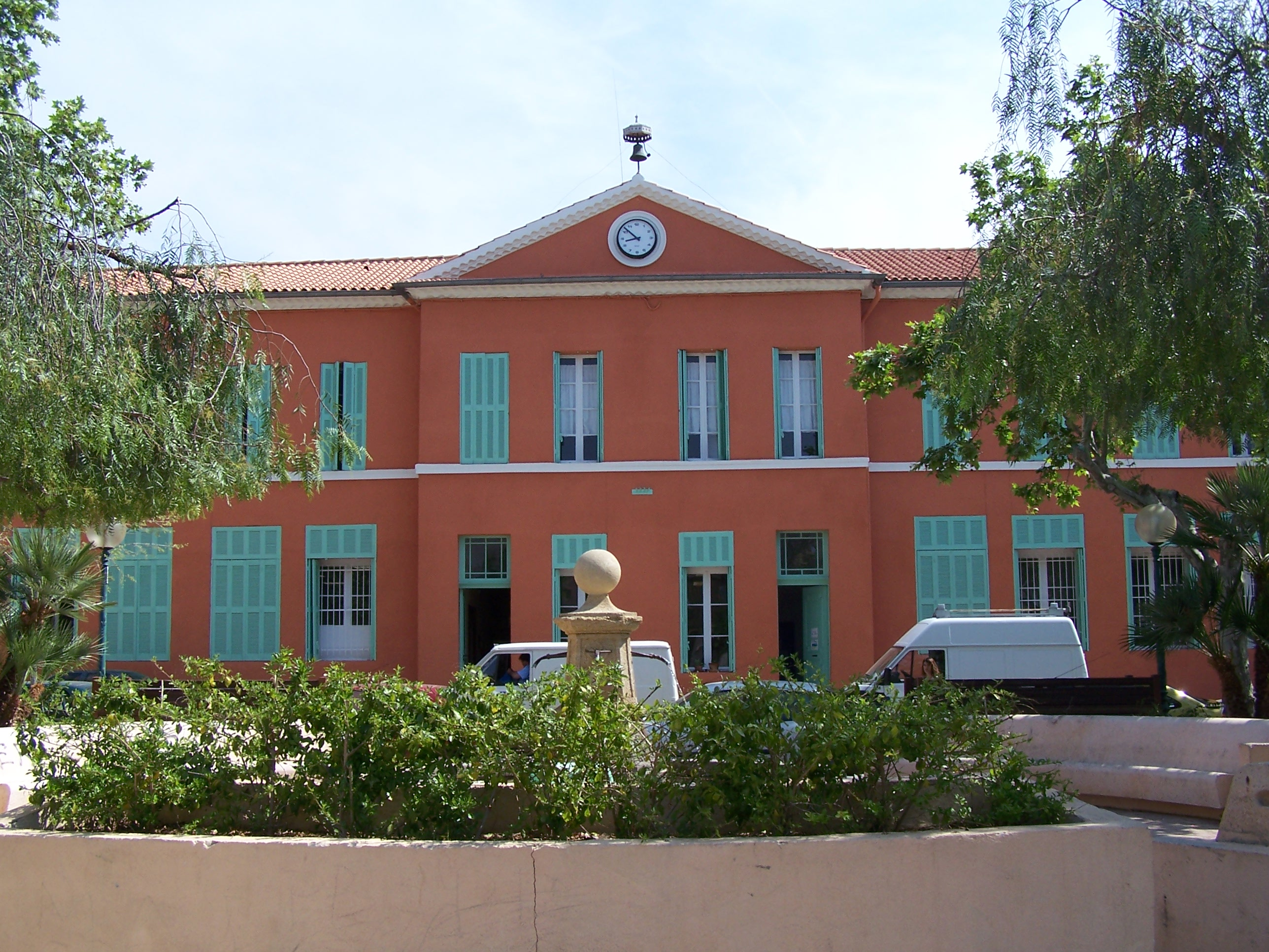 Vue de l'ancien Hotel de ville de la londe